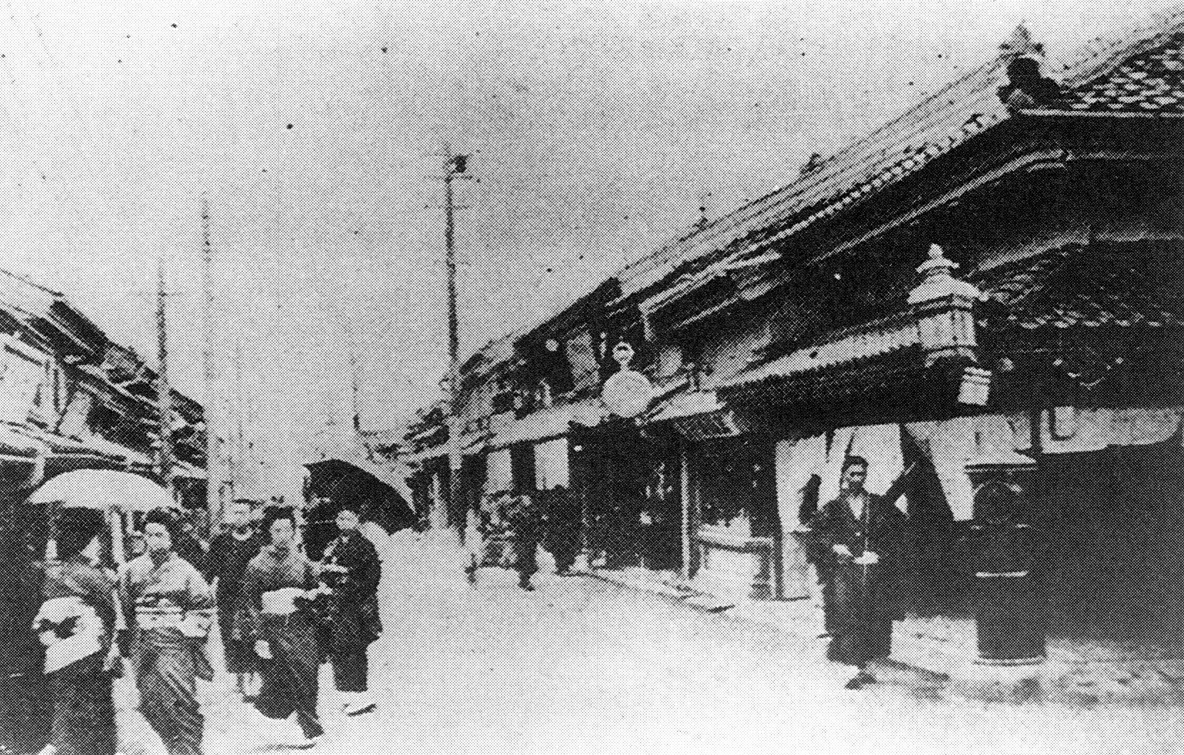 明治末期の富山市・東四十物町通り